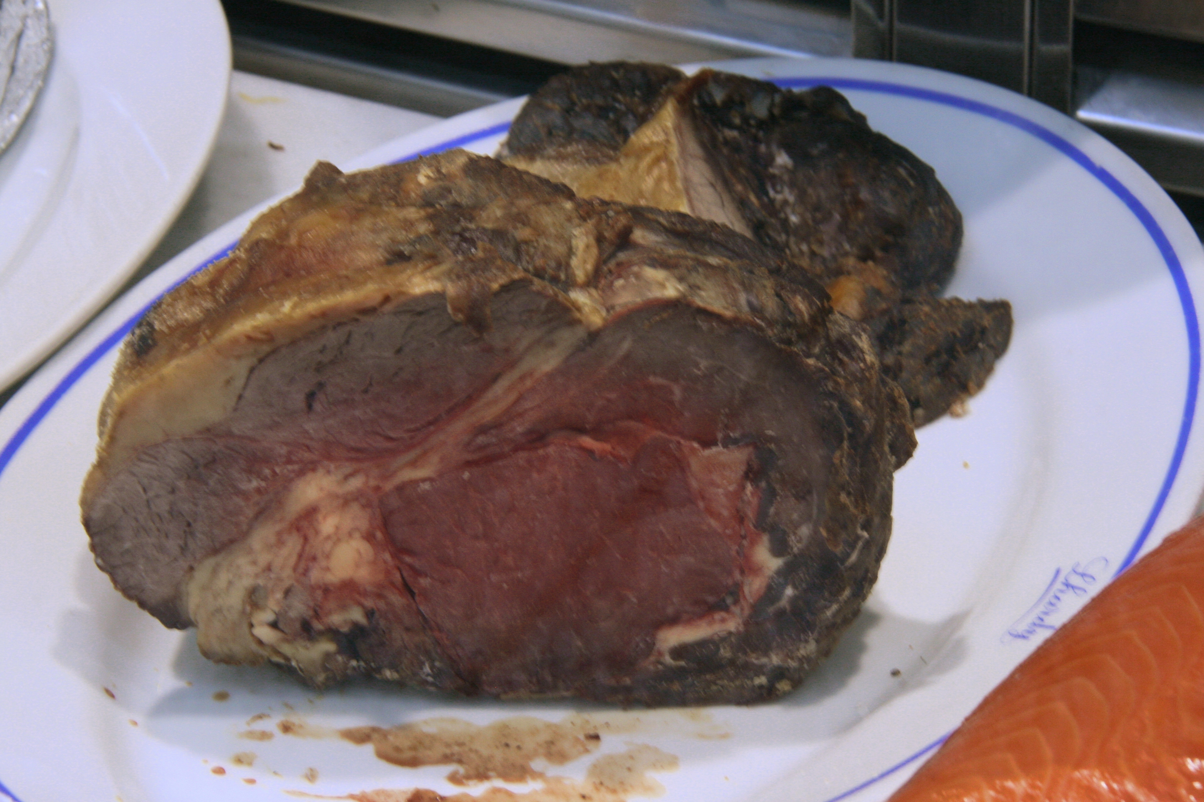 Roastbeef en Lhardy